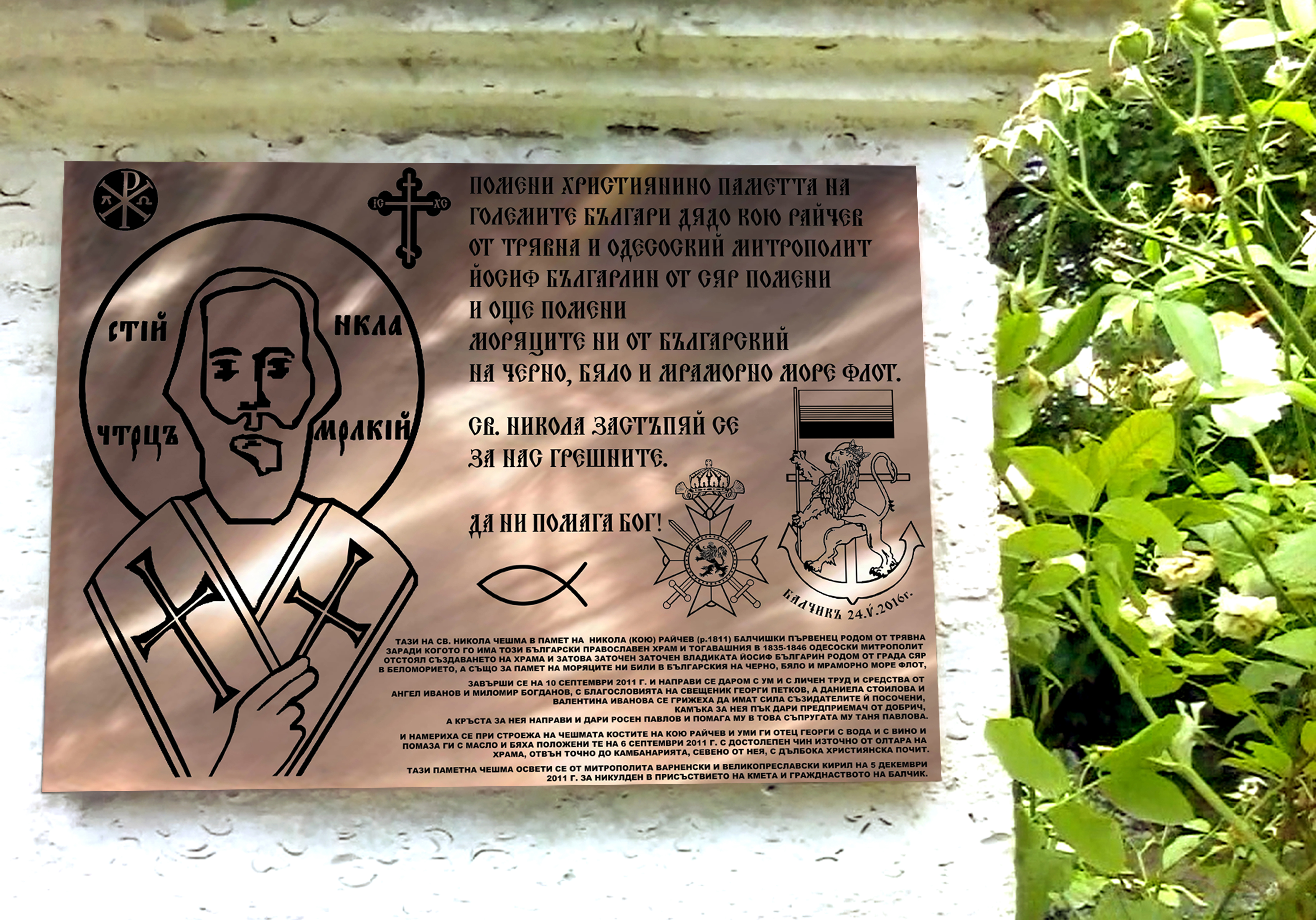 Мемориалната чешма на моряците от Българския Беломорски и Черноморски флот в двора на храма Свети Никола в Балчик - Икона на Св. Никола с текст за възпоменение на възрожденеца Никола (Кою) Райчев, заточения заради застъпничеството за народа си варнански митртополит Йосиф българин от Сяр и моряците от Българския Беломорски и Черноморски флот, поставена на 1 август 2016, автор на чешмата и плочата икона - арх. Миломир Богданов